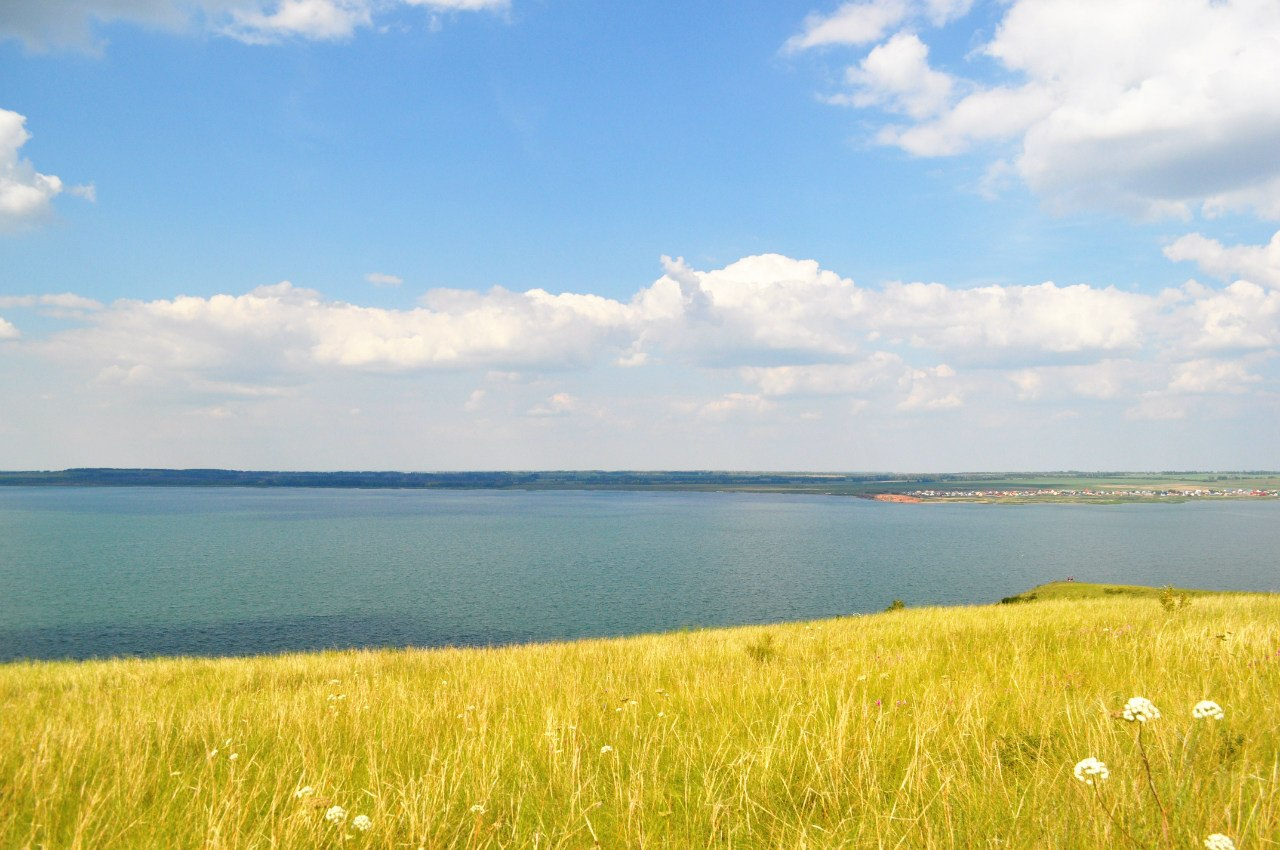 Аслы-Куль, Давлекановский район This image is related to the protected area of Russia number 0210115